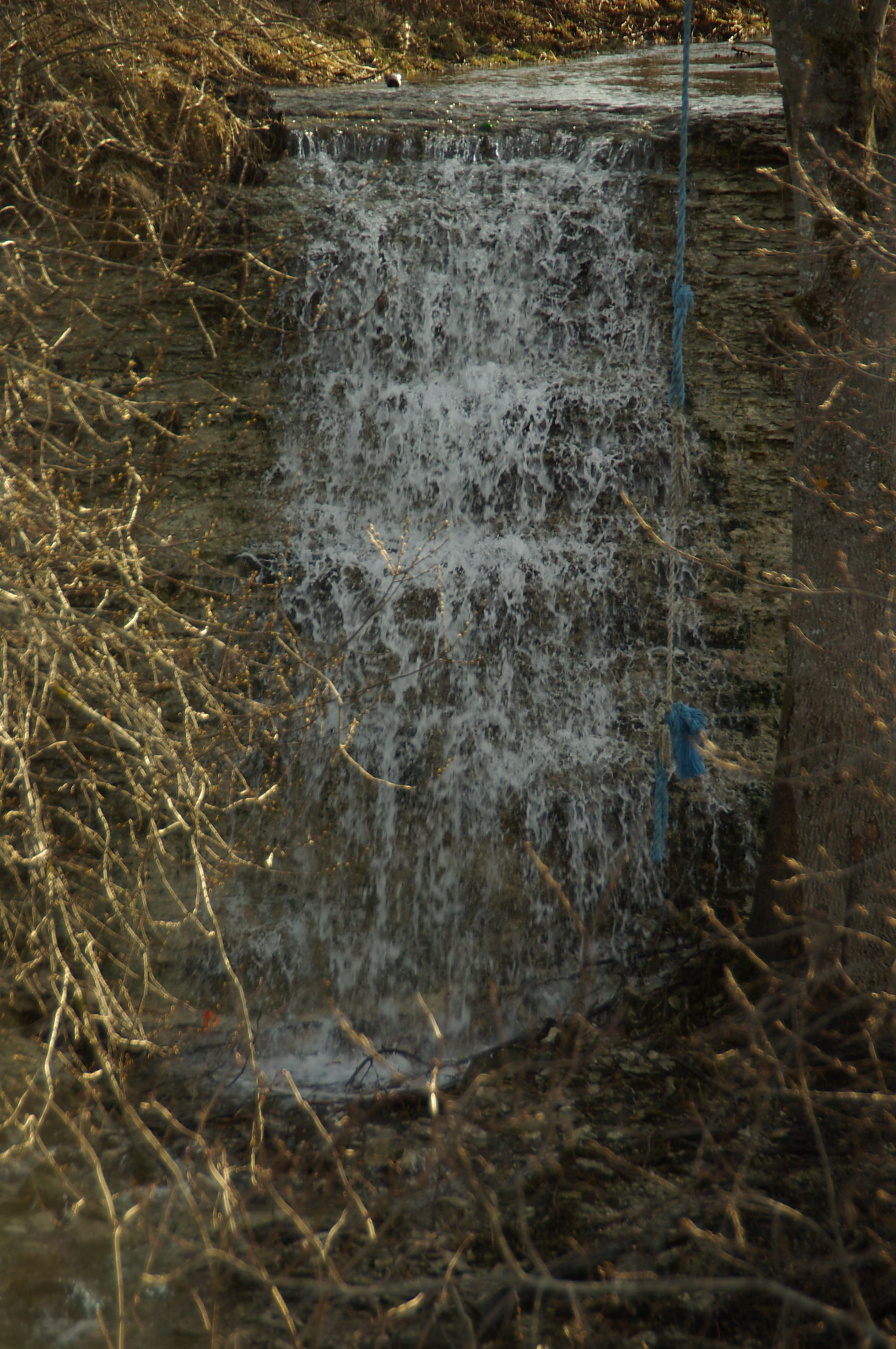 Paldiski juga asub Paldiski linnas